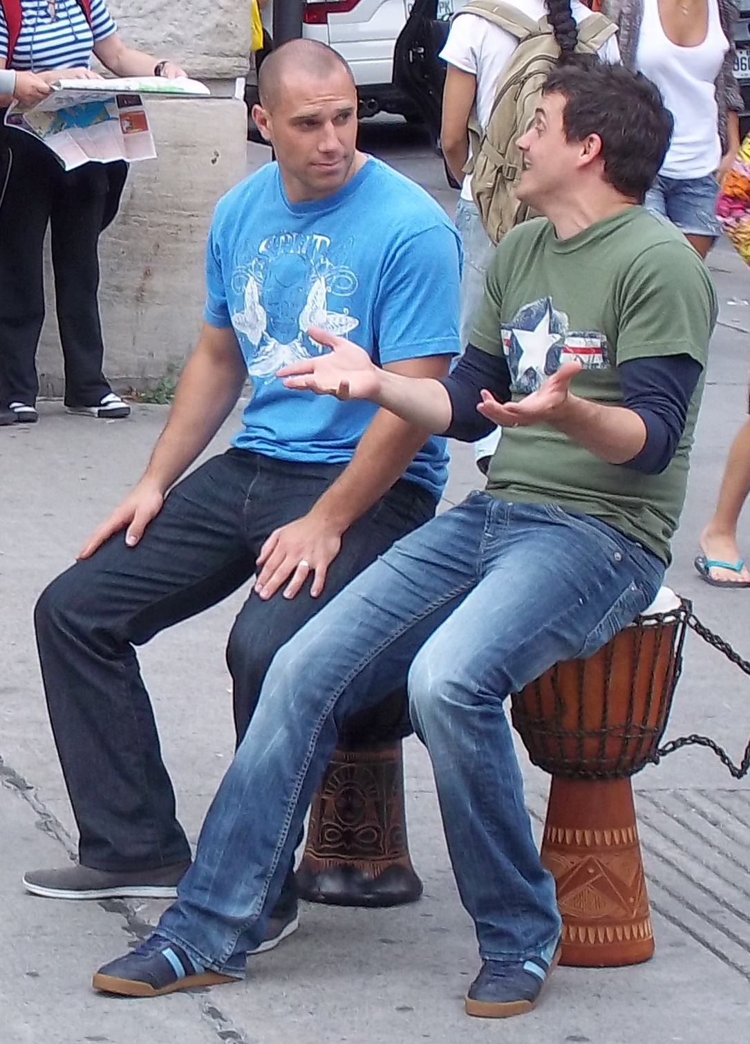 Étienne Boulay et Patrice Bélanger, à l'intersection de l'avenue McGill College et de la rue Sainte-Catherine, à Montréal